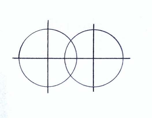 Модель перекрывания атомных орбиталей при образовании сигма-связи